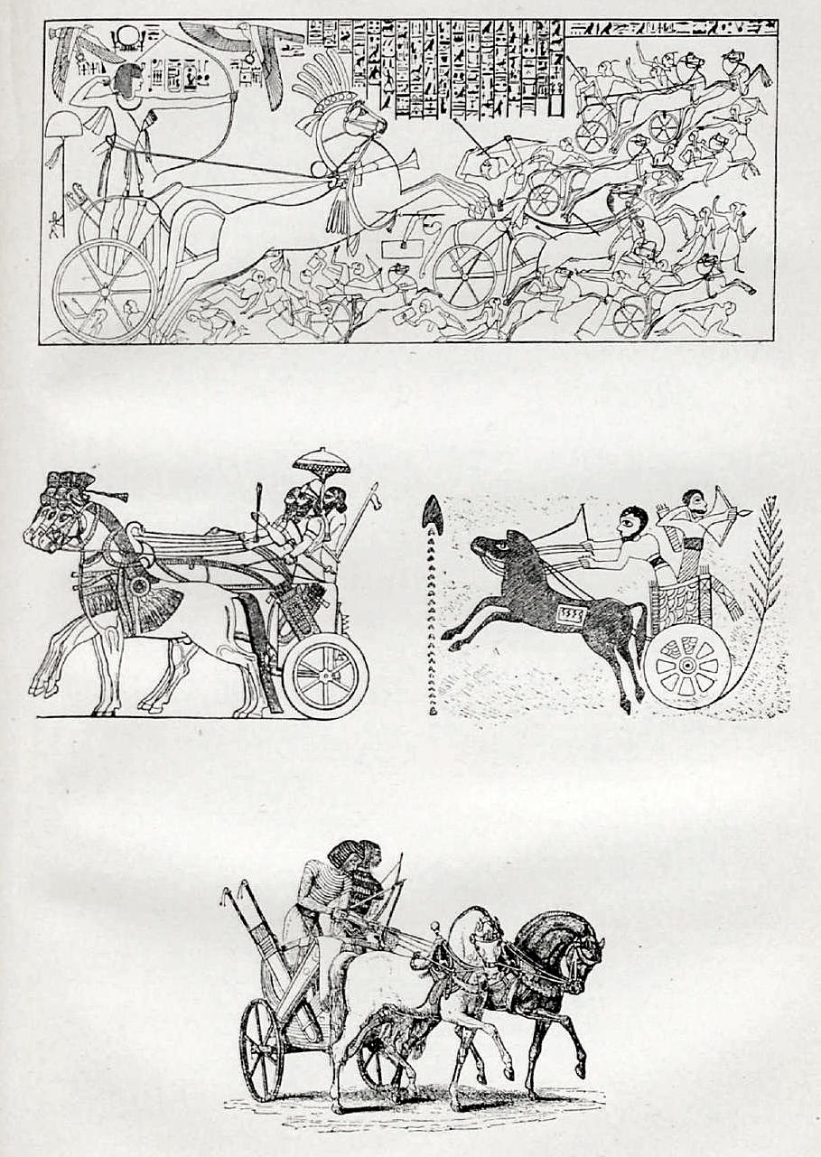 Данное изображение было использовано в статье «Военные колесницы» опубликованной в шестом томе «Военной энциклопедии», который был издан книгоиздательским товариществом Ивана Дмитриевича Сытина в 1912 году в столице Российской империи городе Санкт-Петербурге.